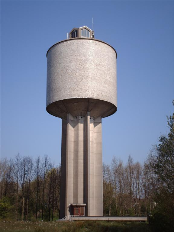 Watertoren Drachten